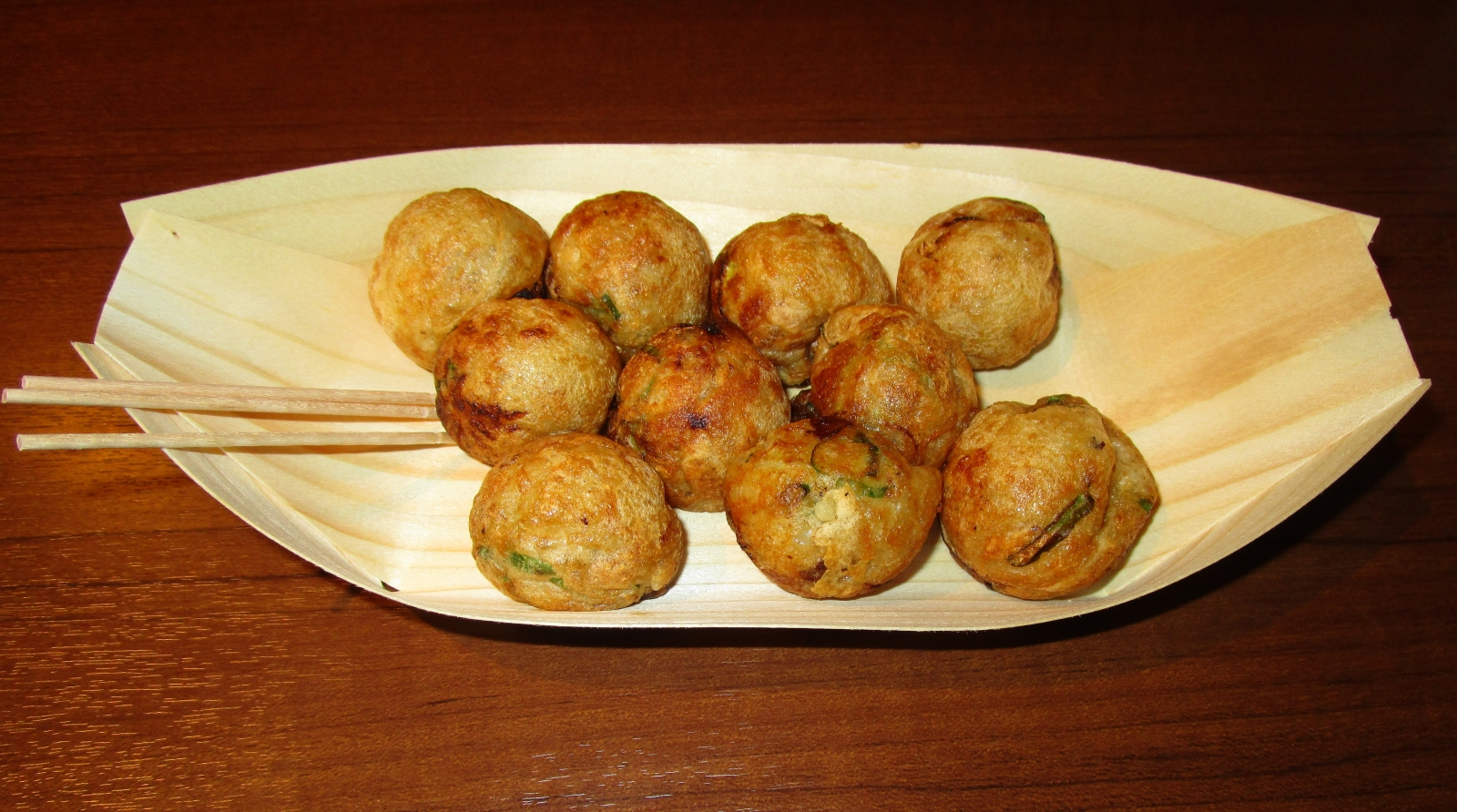 元祖ラヂオ焼き（会津屋にて撮影）